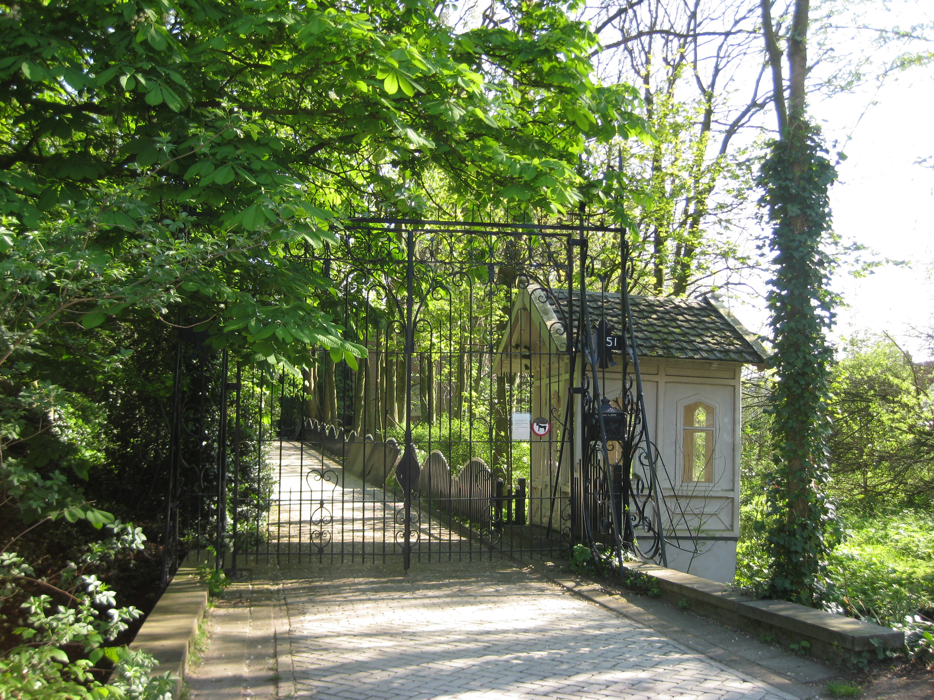 Entree van begraafplaats Huis te Vraag in Amsterdam